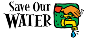 לוגו של קמפיין "הצילו את המים שלנו"